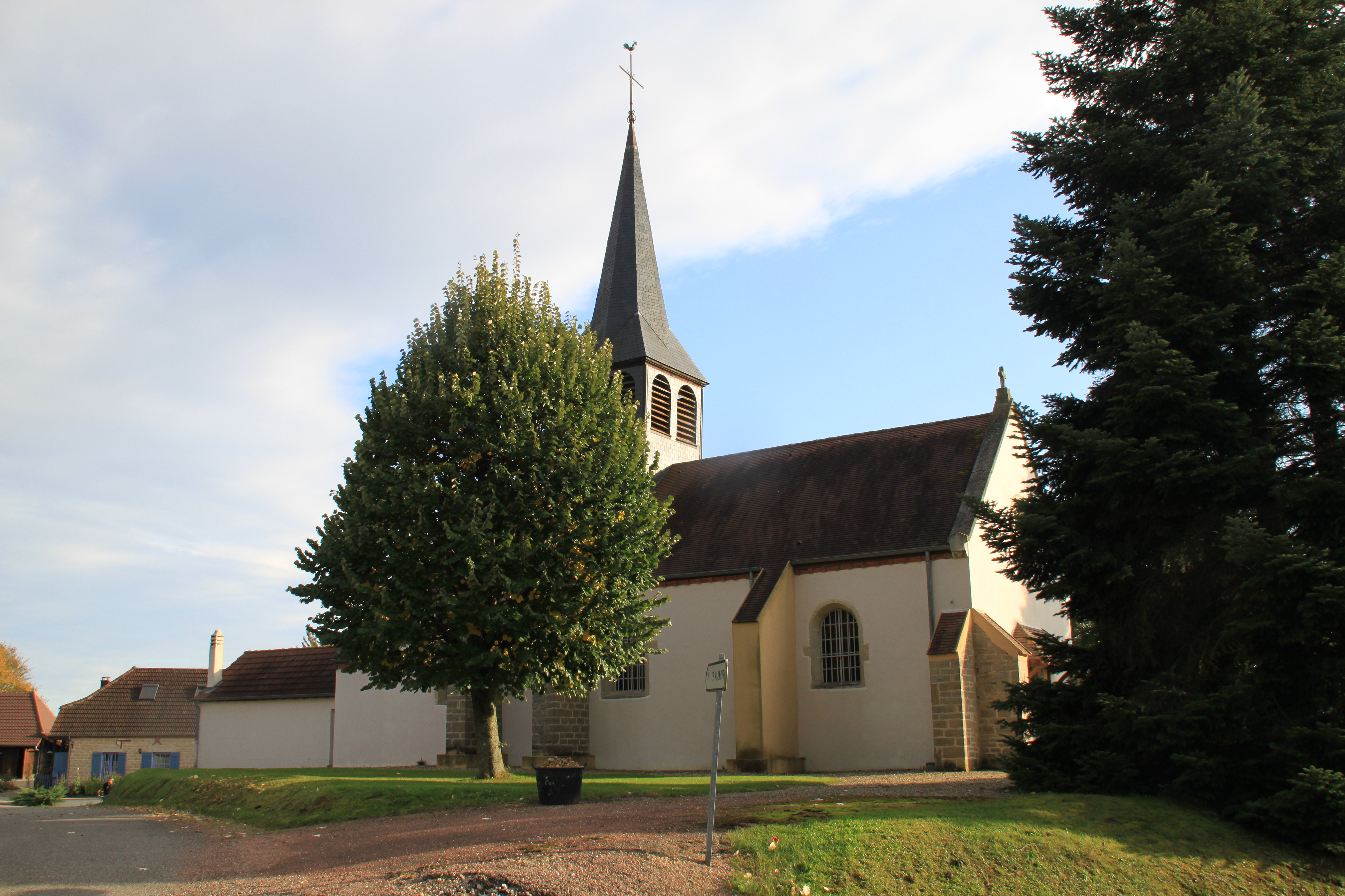 Montjay Kirche